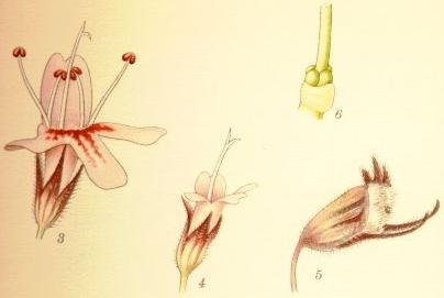 Backtimjan (Thymus serpyllum) 3 tvåkönad blomma (7/1), 4 enkönad (honlig) blomma (7/1), 5 blomfoder i fruktstadiet (8/1), 6 pistillens bas (fyrdelat fruktämne) och där nedanför den stora gula honungskörteln (14/1).